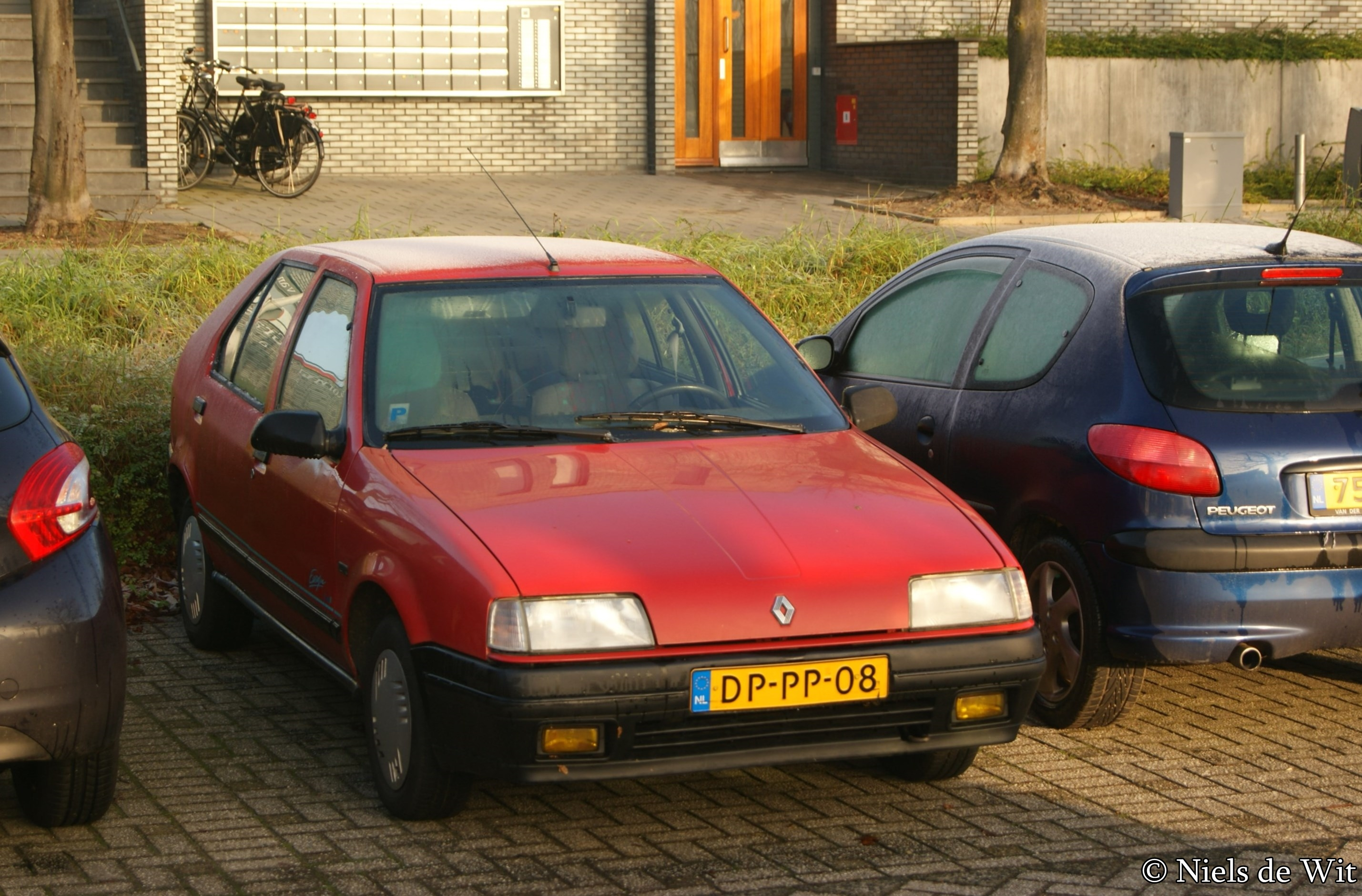 DP-PP-08